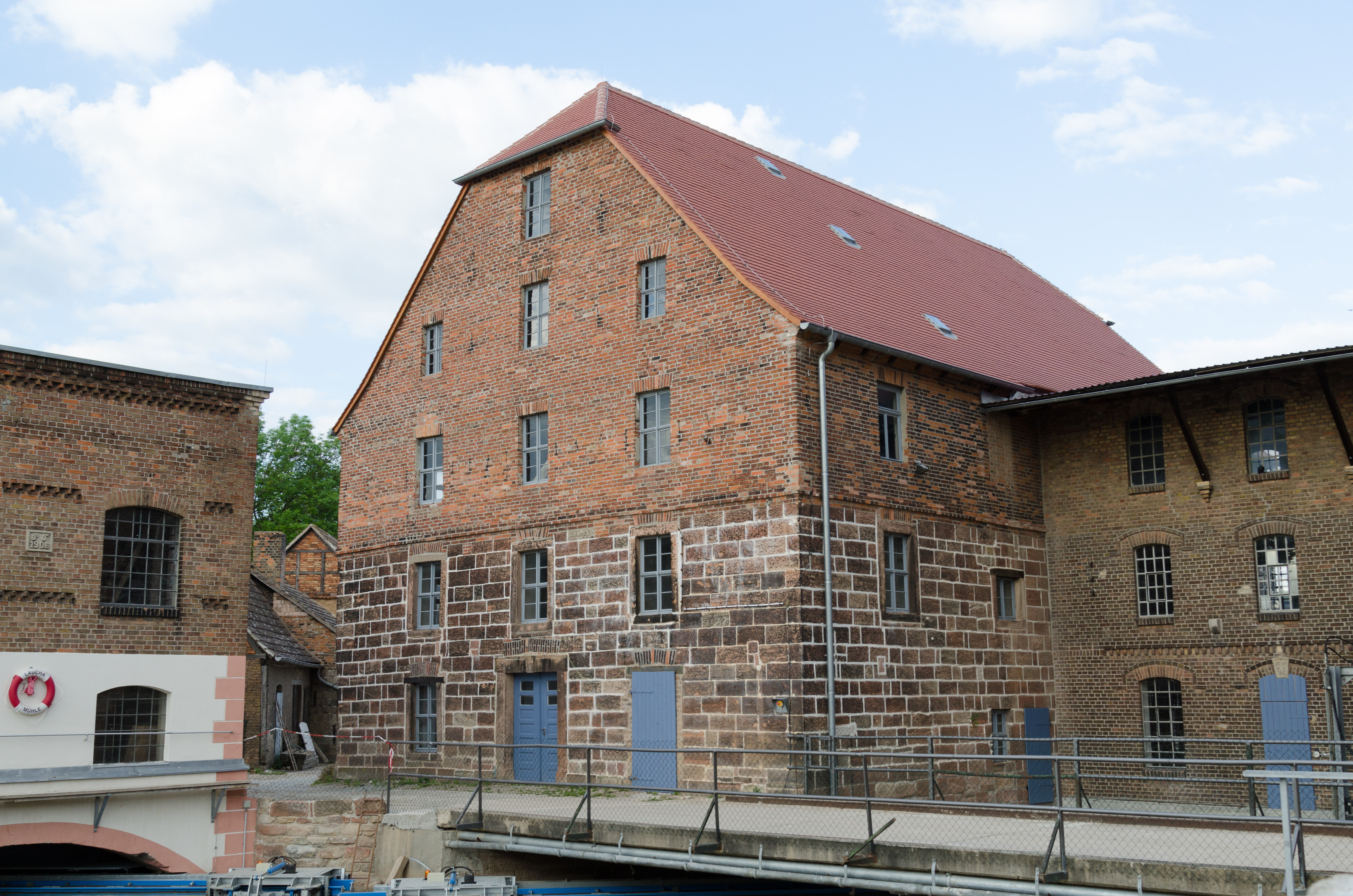 Laucha an der Unstrut, Mühlstraße 1, Tittel-Mühle